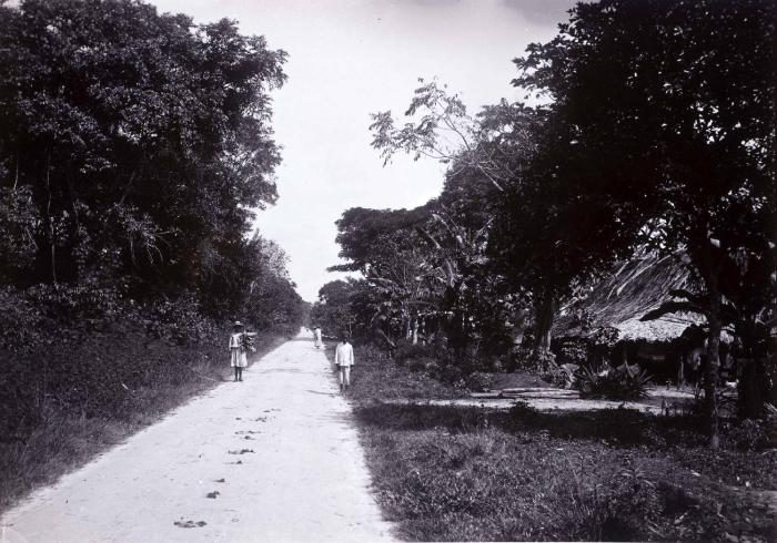 Foto. De Kwattaweg in de omgeving van Paramaribo te Suriname